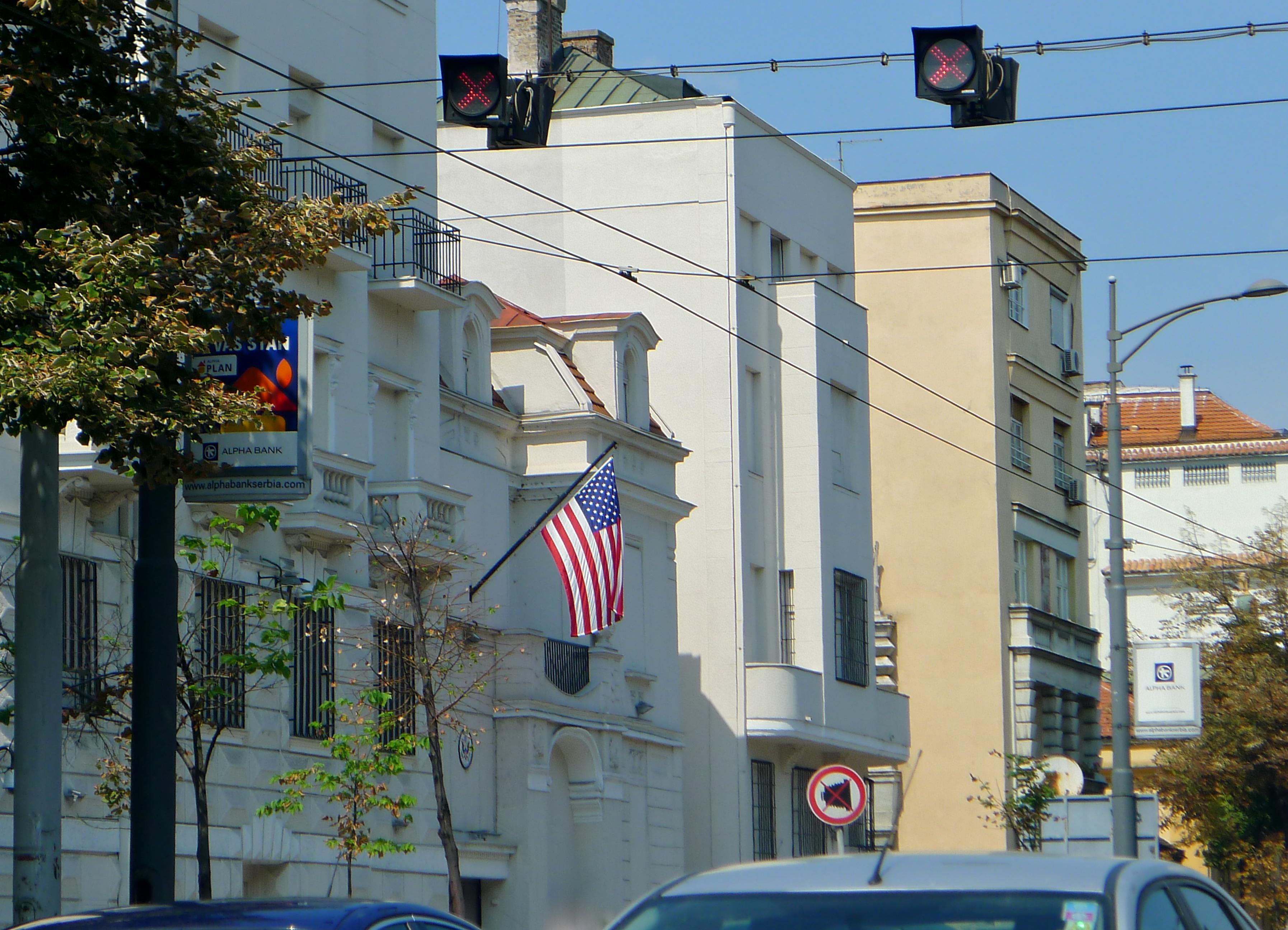 испред демократске Амерске амбасаде без прозора, Улица кнеза Милоша 50, Београд